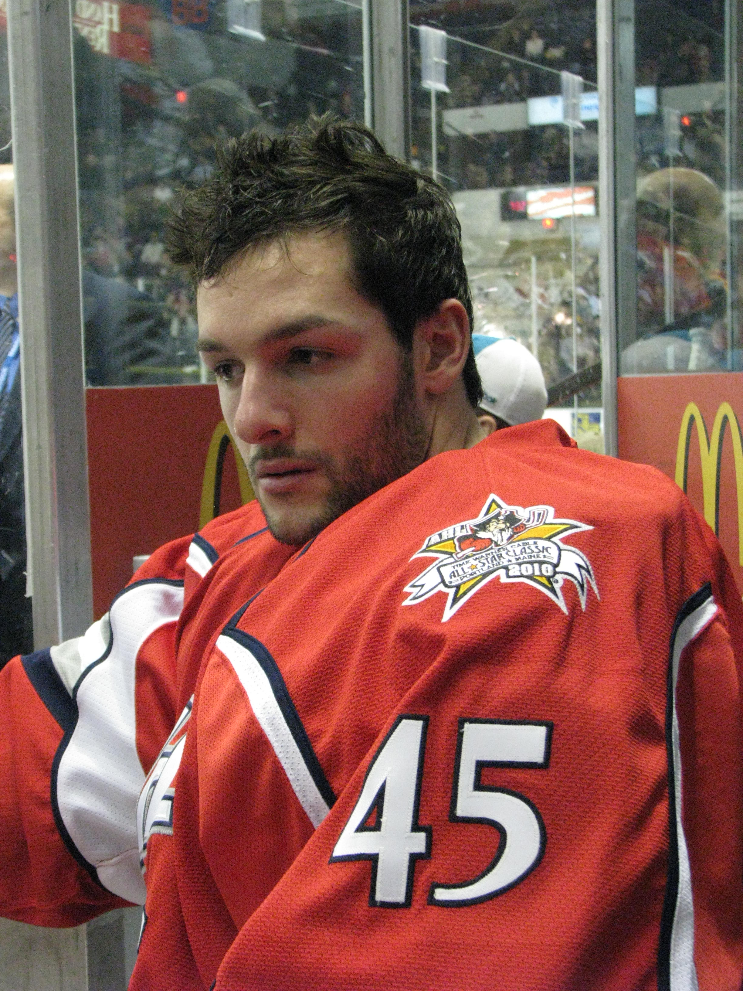 Jonathan Bernier